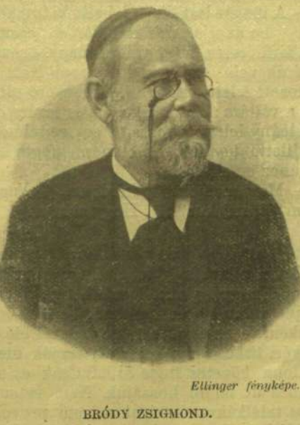 Foto laut hu-WP aus Vasárnapi Ujság 1906. 23. l.